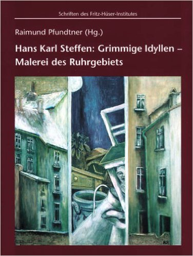 Vorderseite Ausstellungskatalog Hans Karl Steffen, Grimmige Idyllen